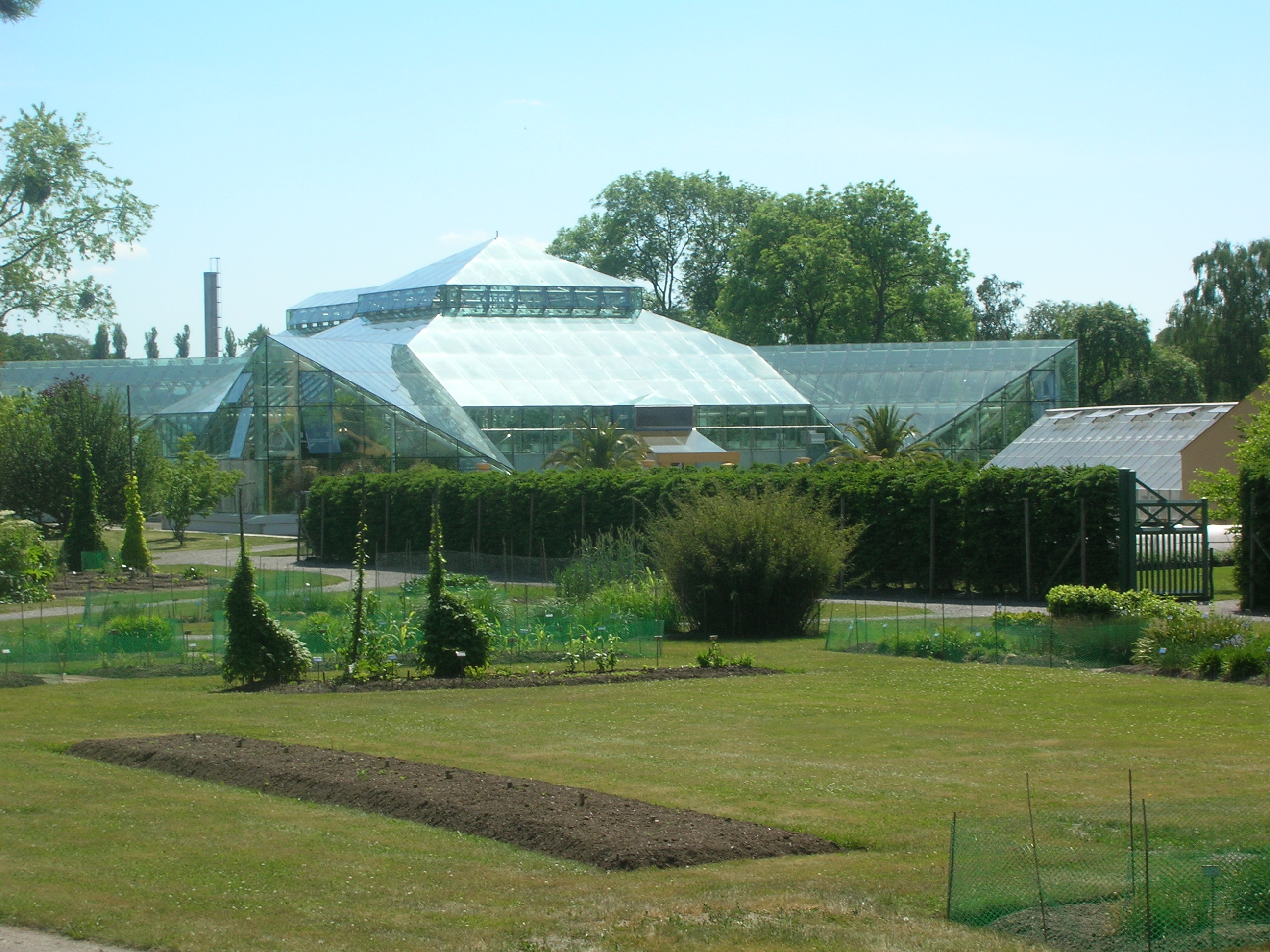 Medelhavsväxthuset, Bergianska Trädgården, Stockholm, Sweden.